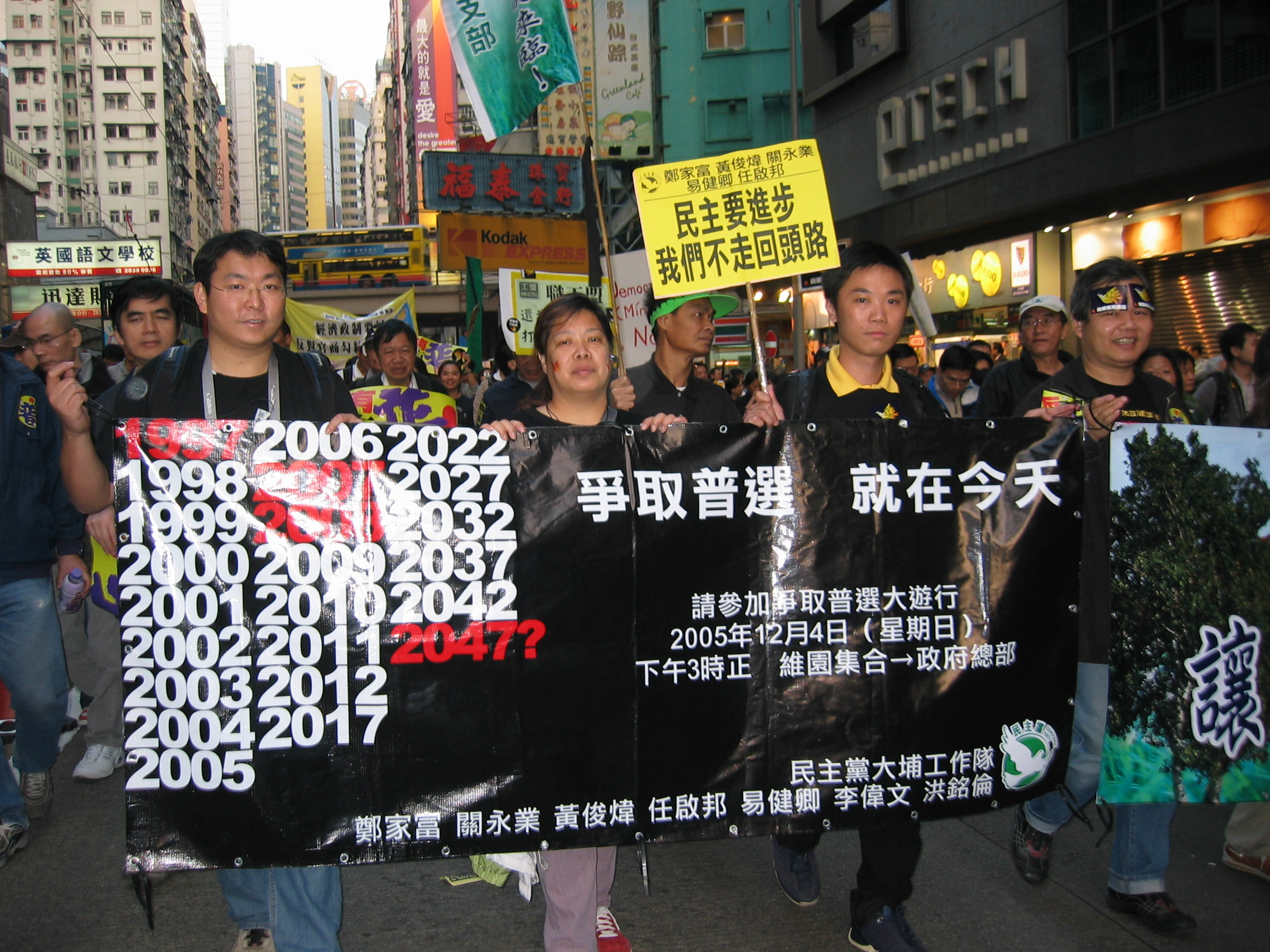 中文（香港）: 關永業等大埔區議員出席124大遊行的相片，由上傳者海豚愛上膠拍攝。